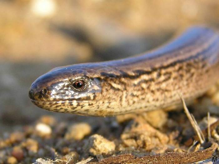 Głowa padalca zwyczajnego.